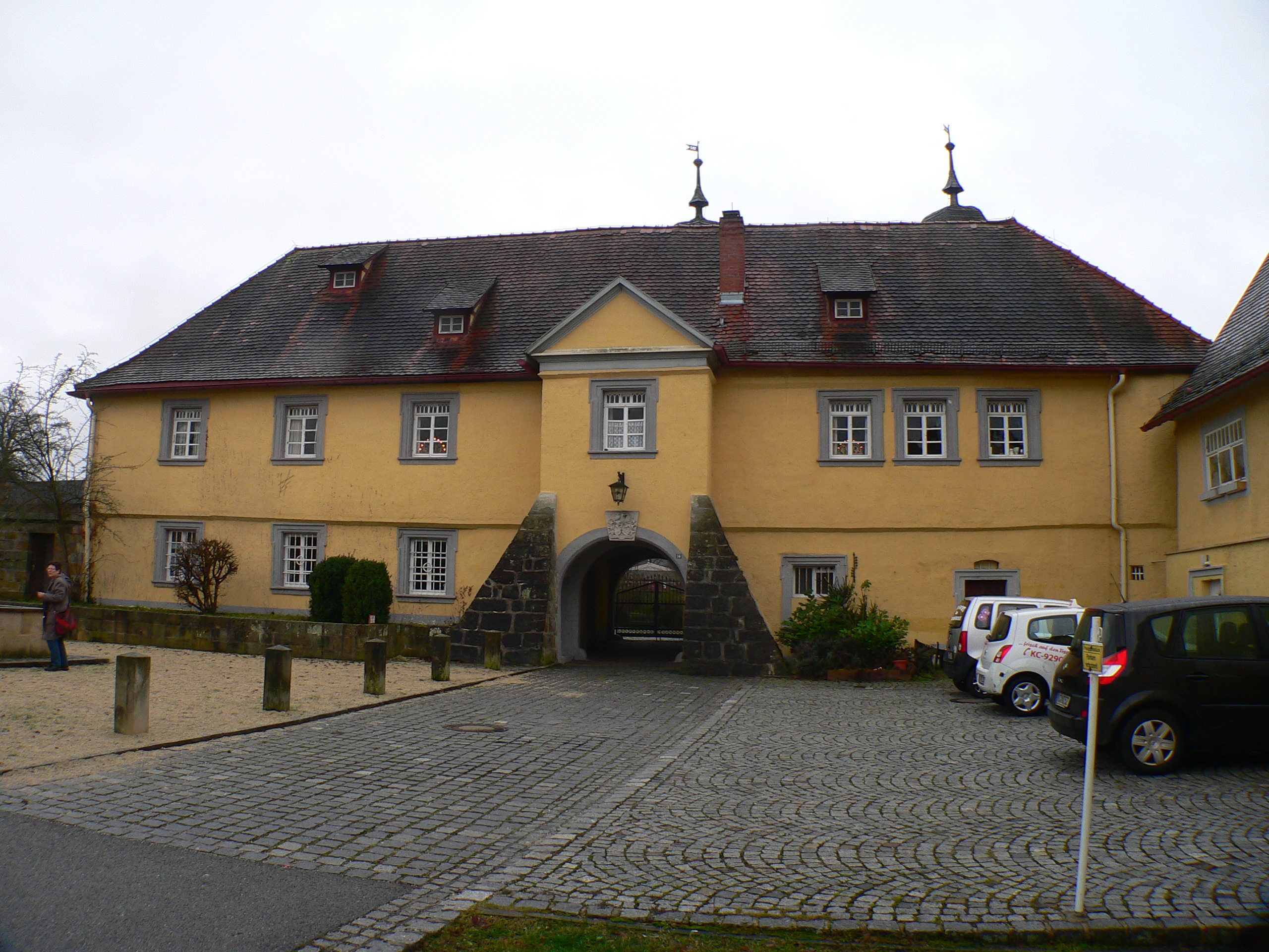 Hinteres (Neues) Schloss in Küps, Bayern, Regierungsbezirk Oberfranken, Landkreis Kronach – Seitenflügel